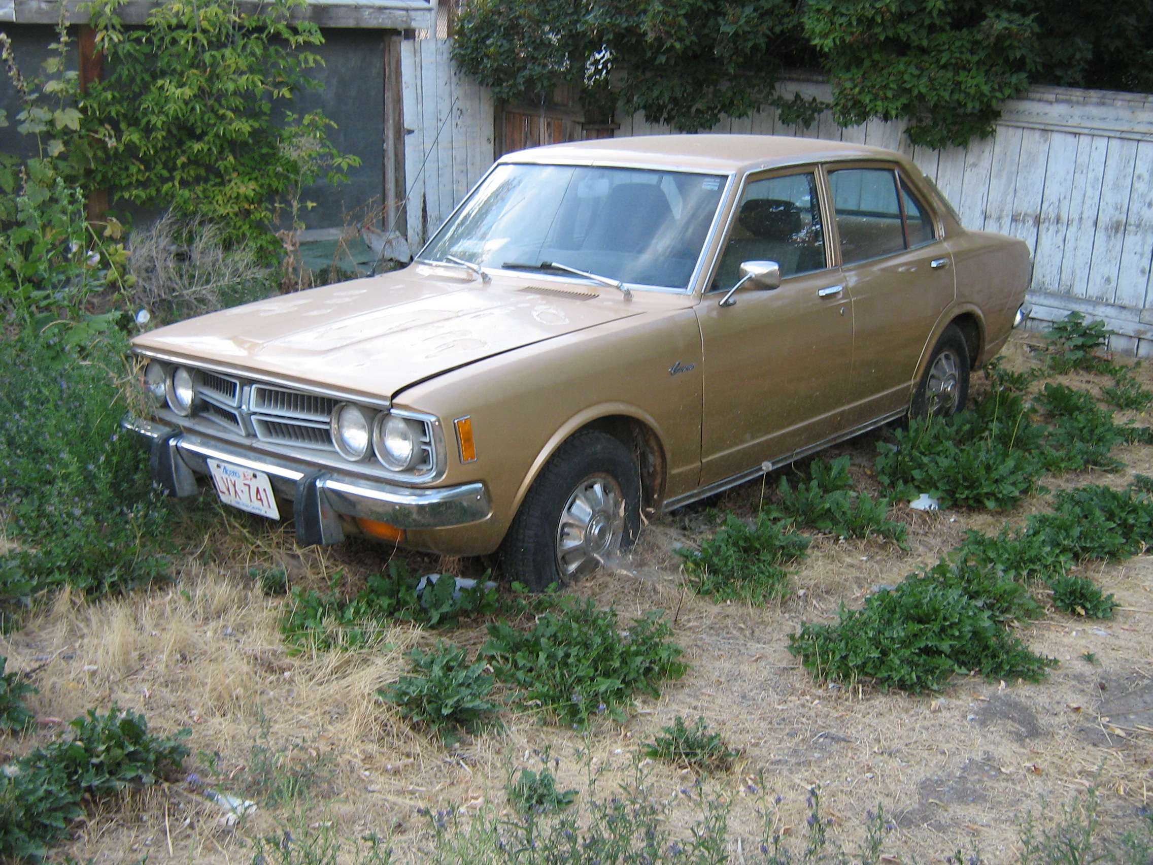 Toyota Corona